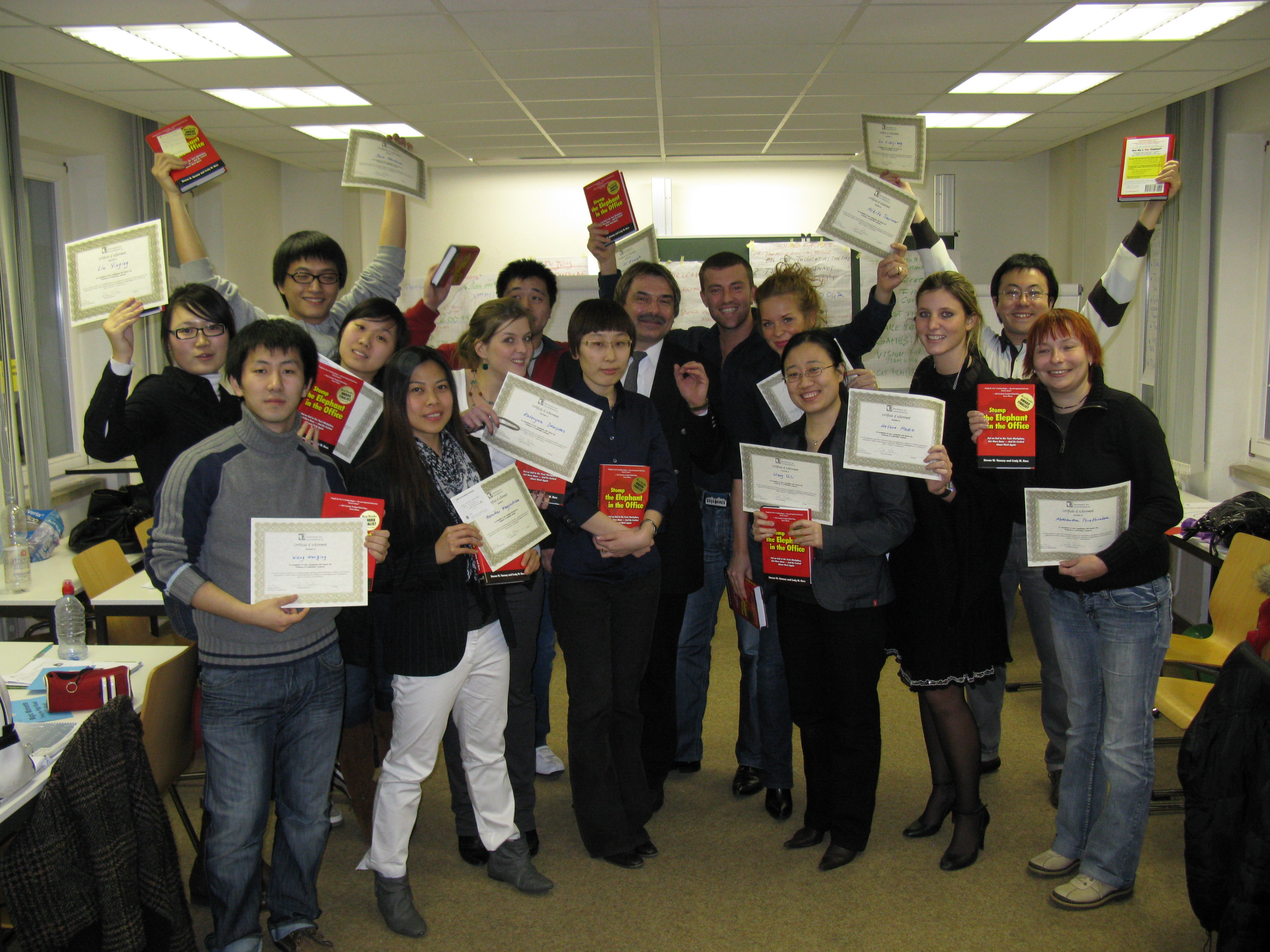 Feierlicher Abschluss eines Moduls des Studiengangs "MBA International Trade", Hochschule Anhalt.